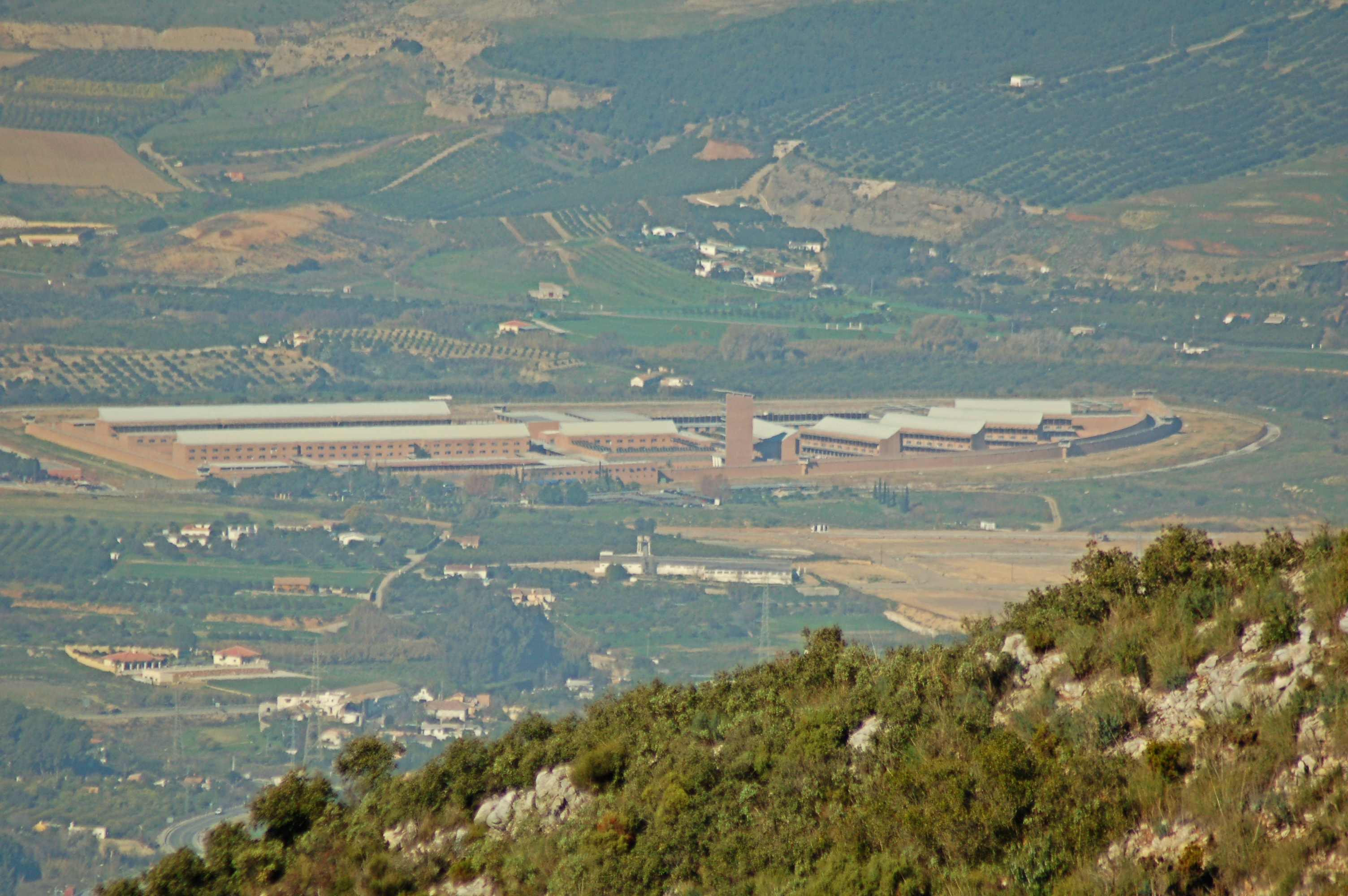 Prisión Provincial de Málaga, Alhaurín de la Torre, España.